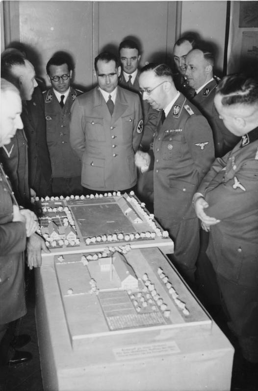 Der Stellvertreter des Führers, Rudolf Hess, besichtigte heute in Berlin eine vom Reichsführer-SS Heinrich Himmler durchgeführte Ausstellung über Aufbau und Planung im Osten. Dabei machte der Reichsführer-SS in seiner Eigenschaft als Reichskommissar zur Festigung des deutschen Volkstums grundsätzliche Ausführungen über die geplante bäuerliche Siedlung in den wiedergewonnenen Ostgebieten und erläuterte sie eingehend anhand von Modellen und Zeichnungen. 20.3.41